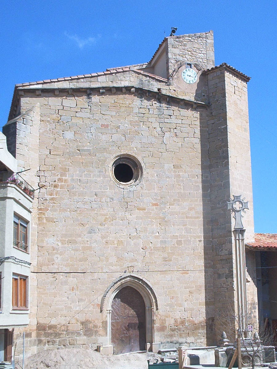 Església de Nostra Senyora de l'Assumpció de Ràfels (Matarranya)